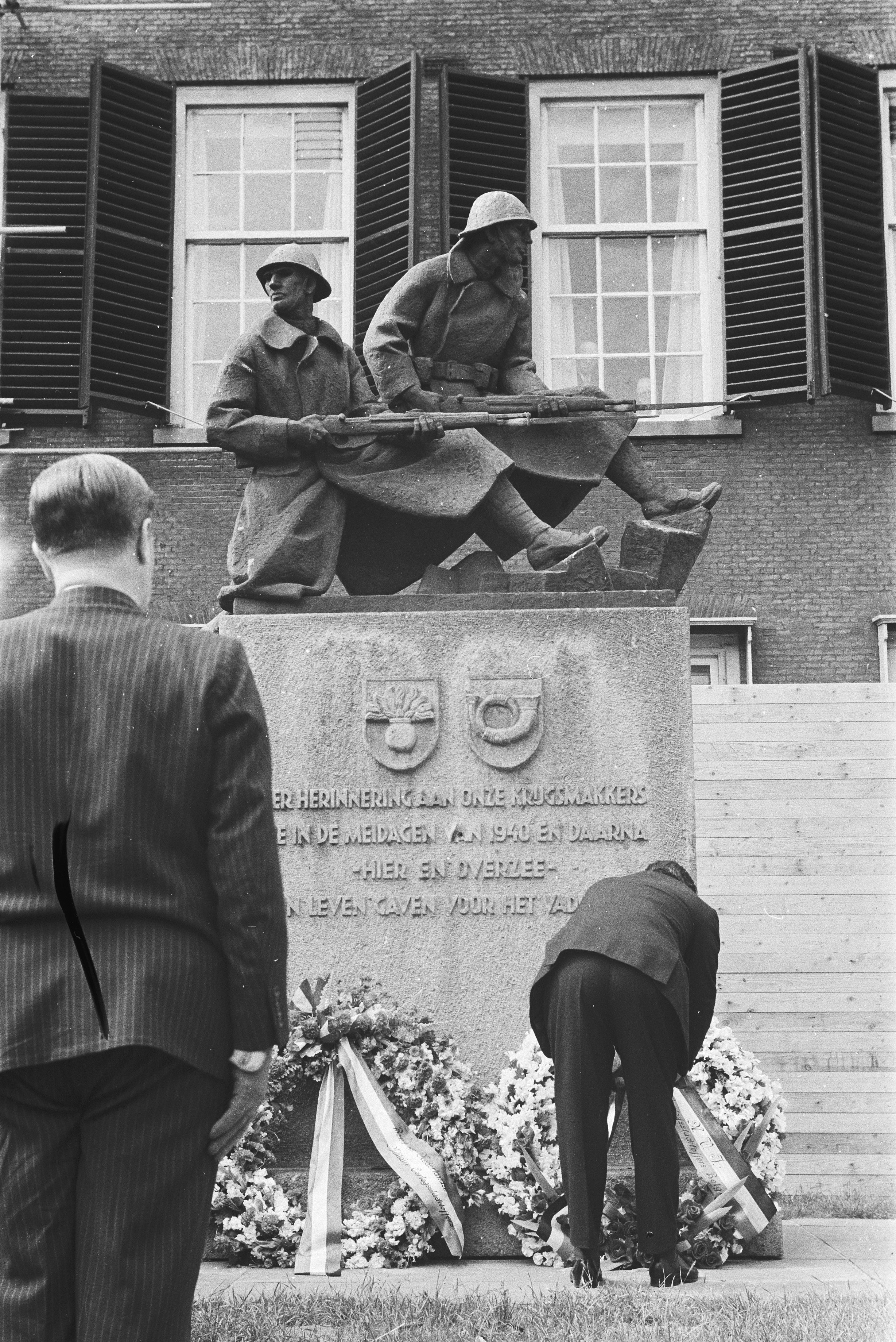 Collectie / Archief : Fotocollectie Anefo Reportage / Serie : [ onbekend ] Beschrijving : Bond van Nederlandse Militaire Oorlogsslachtoffers herdenkt derde lustrum, kranslegging door de heer Van Lanschot (l) Datum : 11 juni 1960 Trefwoorden : kransleggingen Persoonsnaam : Bond van Nederlandse Militaire Oorlogsslachtoffers Fotograaf : Pot, Harry / Anefo Auteursrechthebbende : Nationaal Archief Materiaalsoort : Negatief (zwart/wit) Nummer archiefinventaris : bekijk toegang 2.24.01.05 Bestanddeelnummer : 911-3312